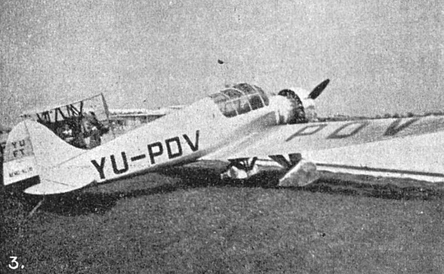 Fizir FT-1 Nebojša na soutěži turistických letadel kolem Malé dohody (Letectví, září 1938)